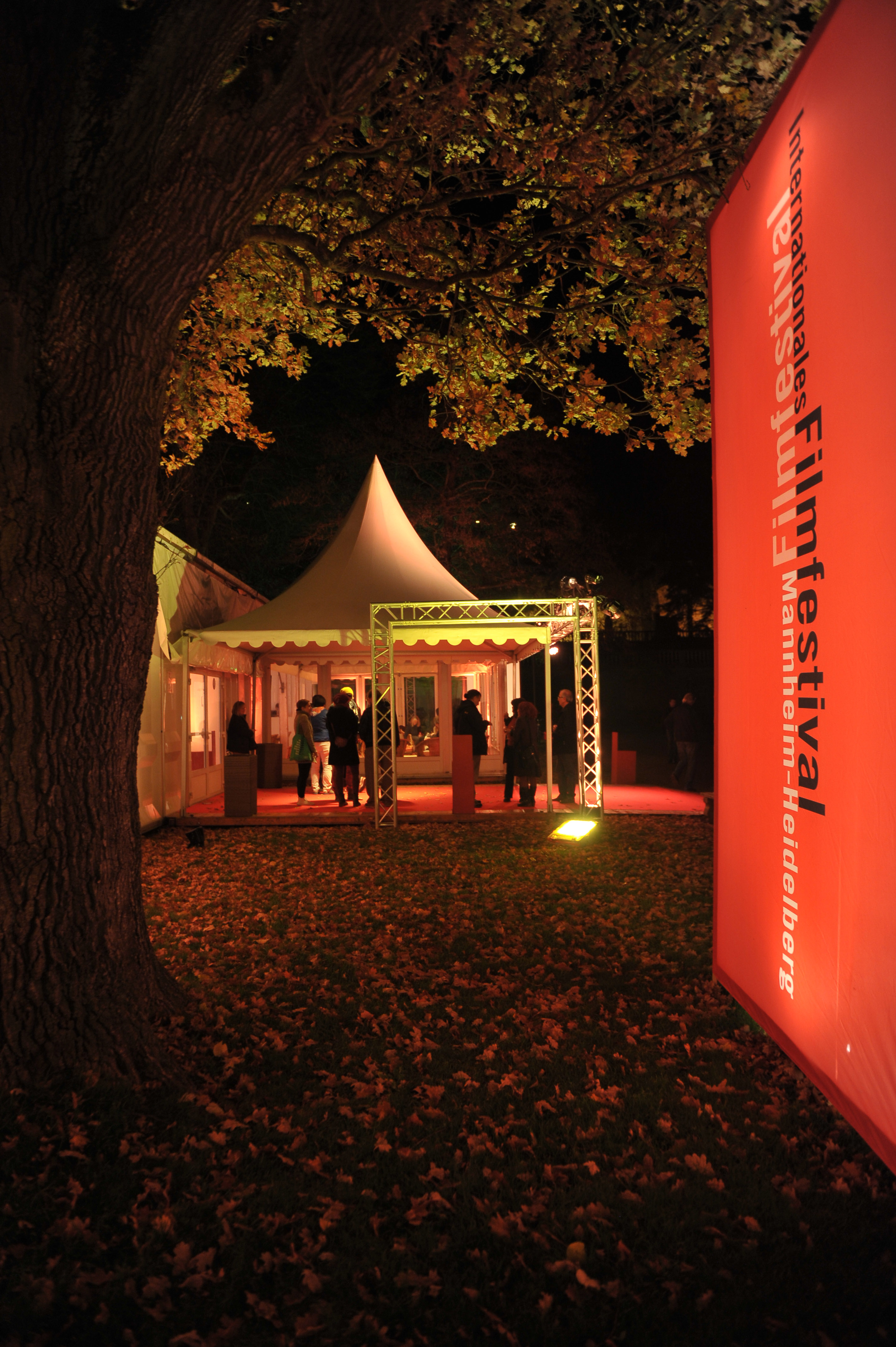 Spielort in Heidelberg